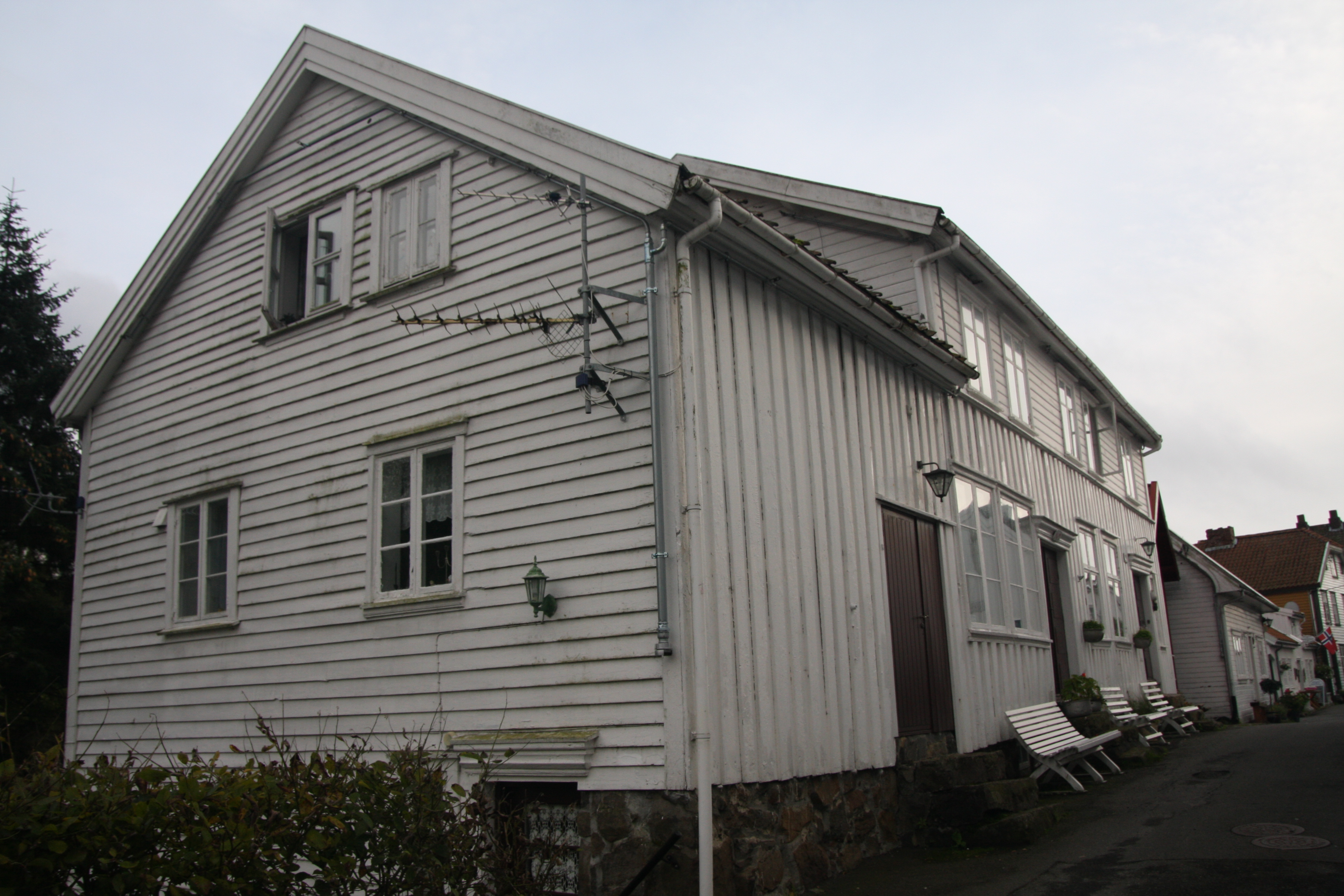 Steinstad - Strandgaten 16